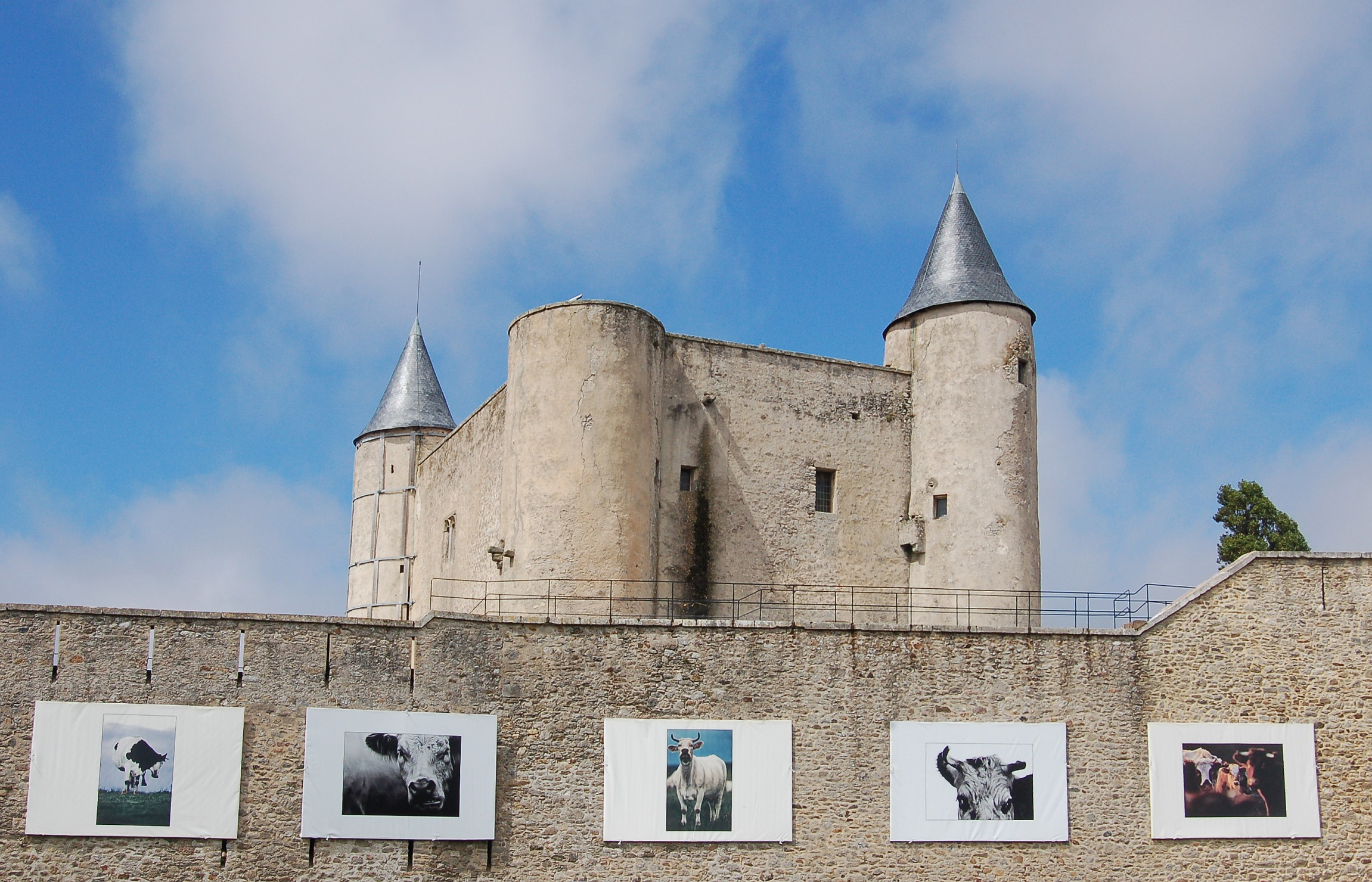 Burg Noirmoutier in Noirmoutier-en-l'Île (Insel Noirmoutier)